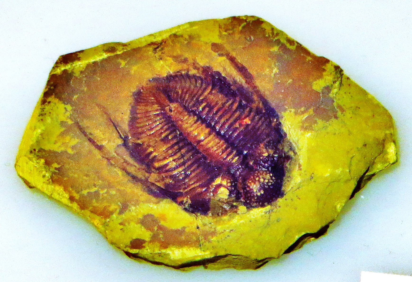 Fossil of Coronocephalus , an extinct trilobite- Took the picture at Museo di Arsago Seprio